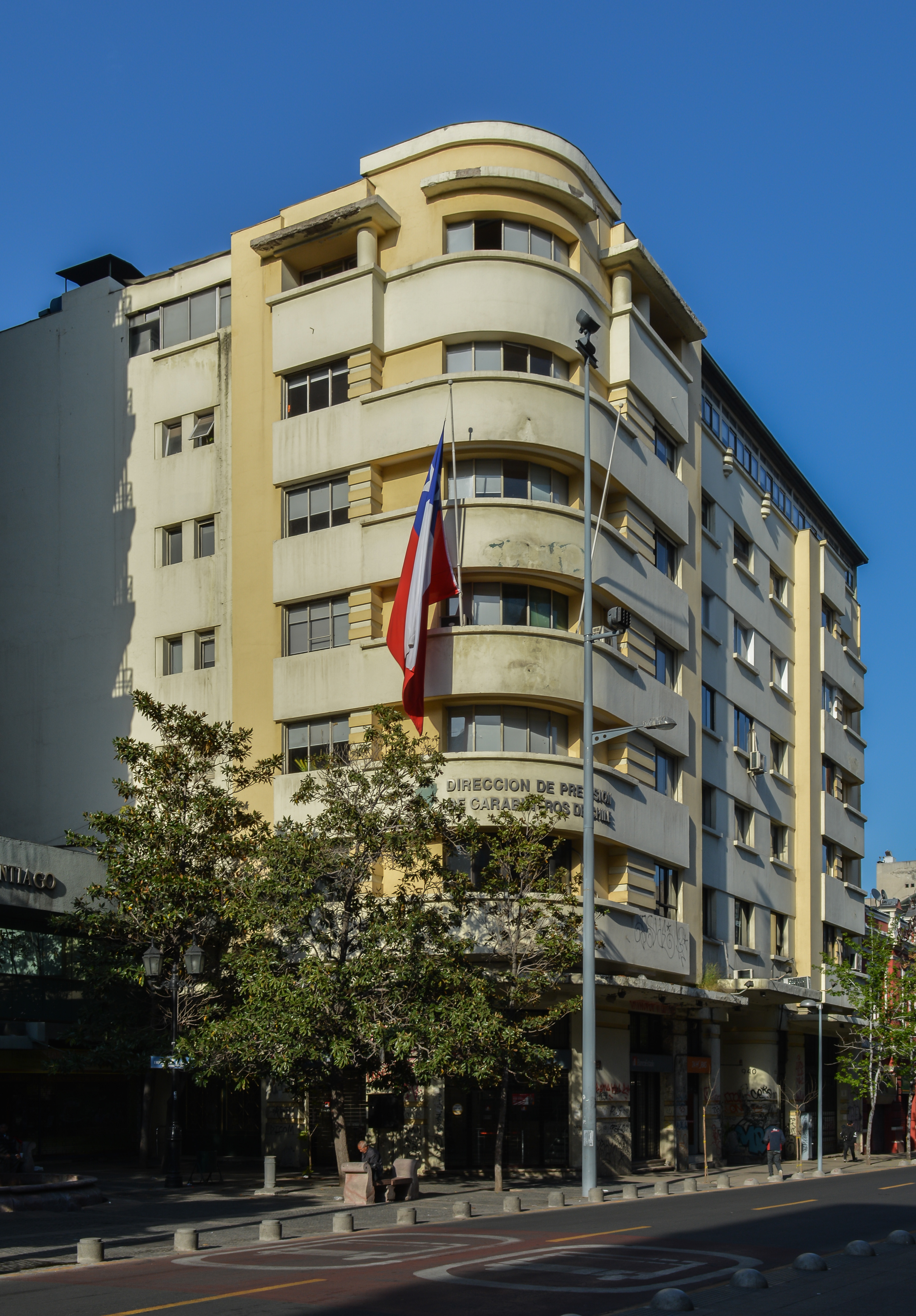 Dirección de Previsión de Carabineros de Chile, Santiago, Chile